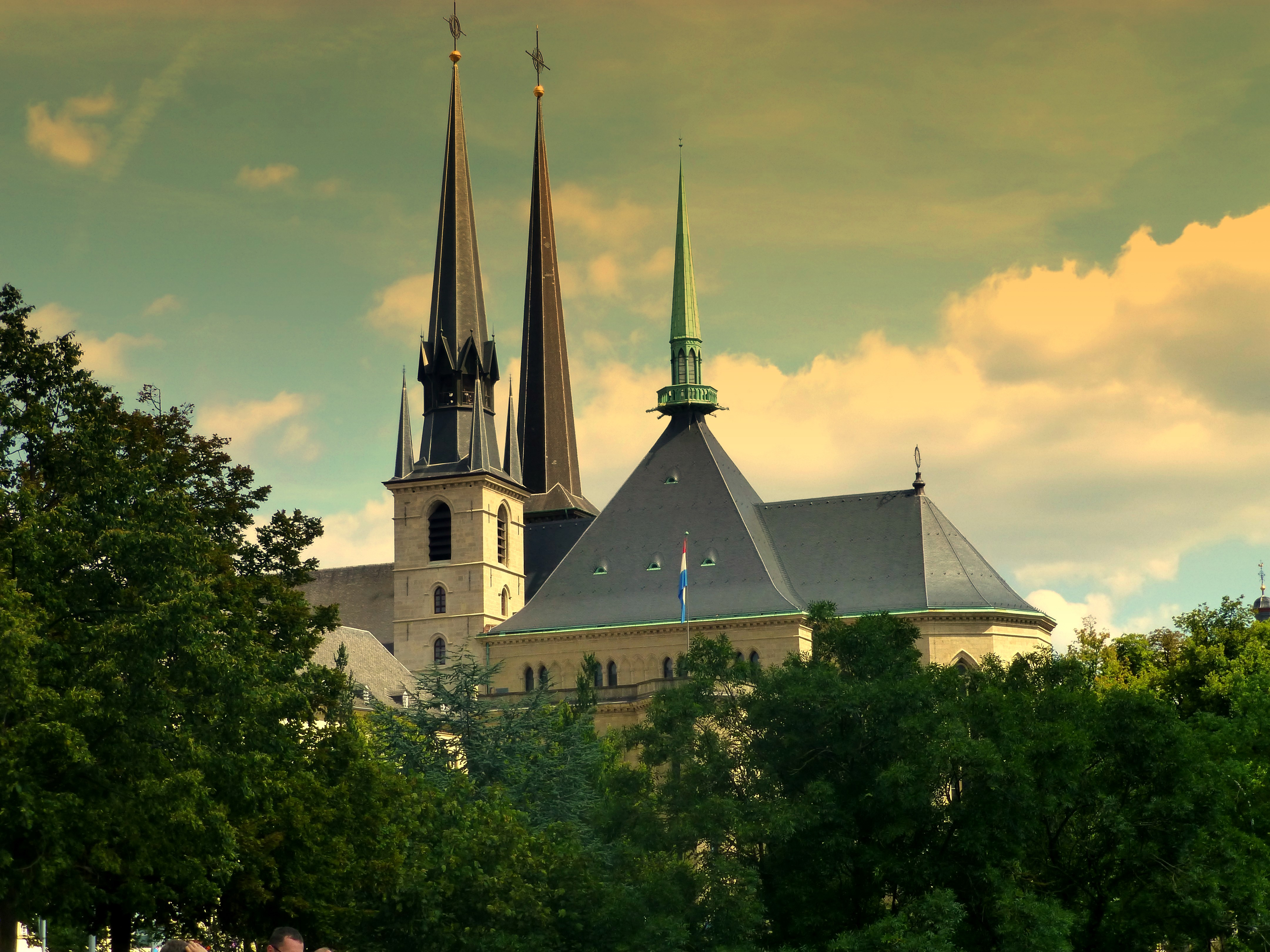 Luxemburg - Kathedrale unserer lieben Frau von Luxemburg - Cathédrale Notre-Dame de Luxembourg